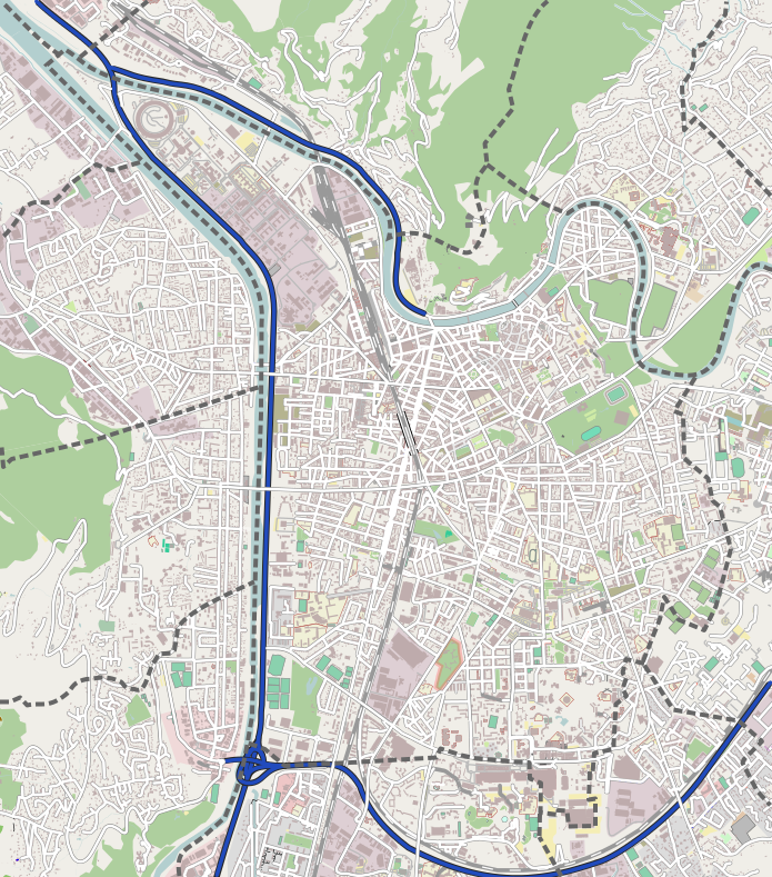 Carte de Grenoble, réalisée à partir des données de OpenStreetMap. Couleurs retouchées pour un usage sur wikipedia et suppression du code couleur relatif aux grands axes routiers. Modifications faites par moi-même Pedro38 sous Inkscape